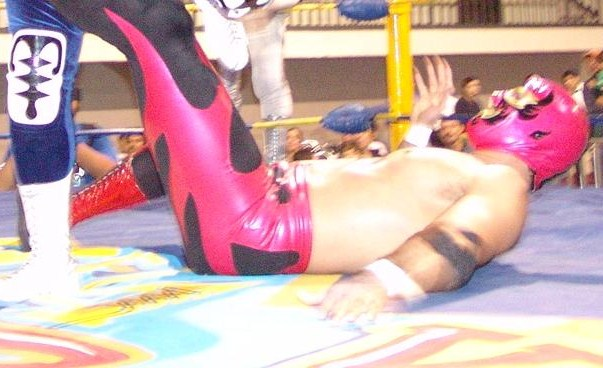 Dos Caras Jr. luchando en la Arena Coliseo de Monterrey.